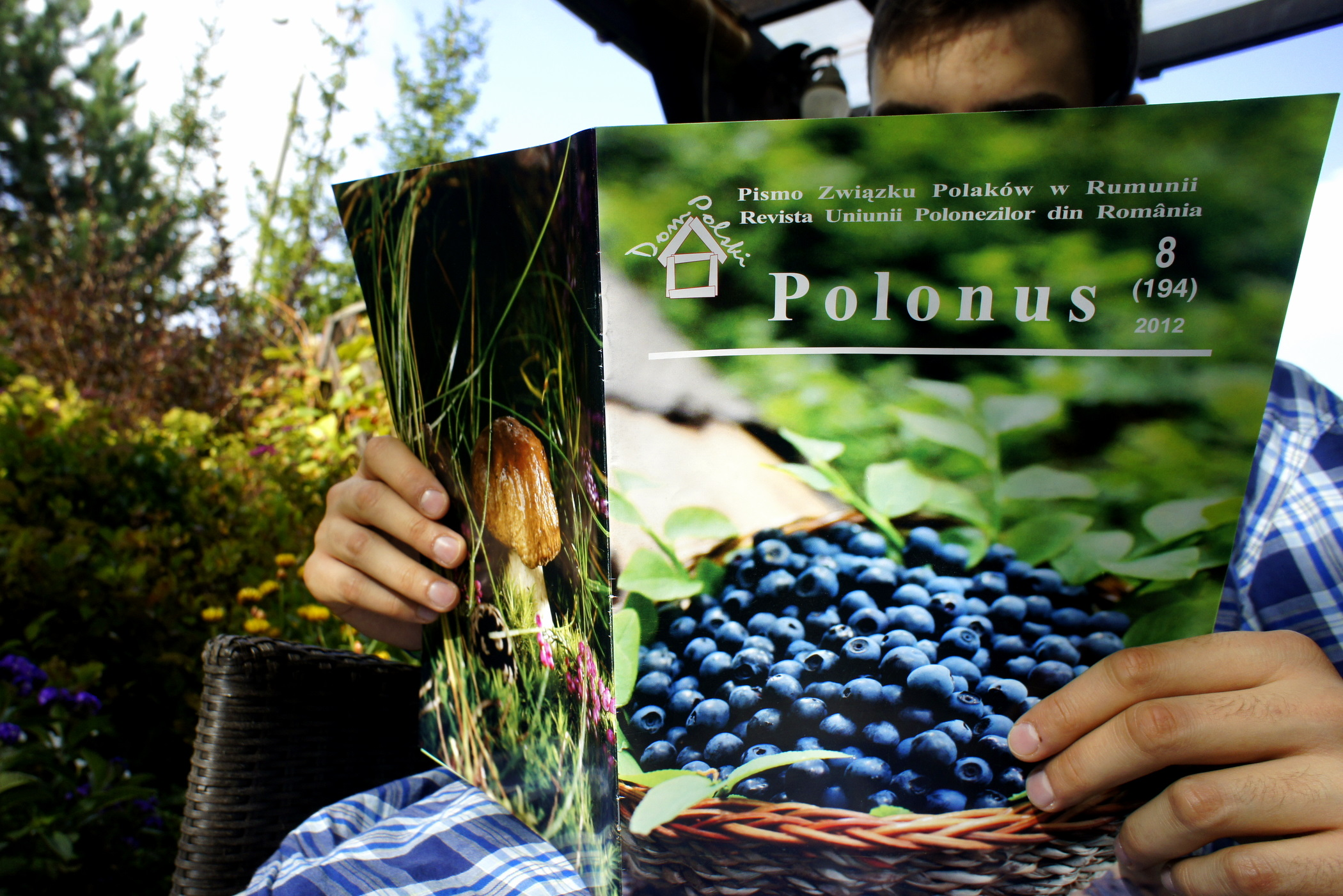 Suczawa. Polonus, pismo Związku Polaków w Rumunii ( 2012 r. )